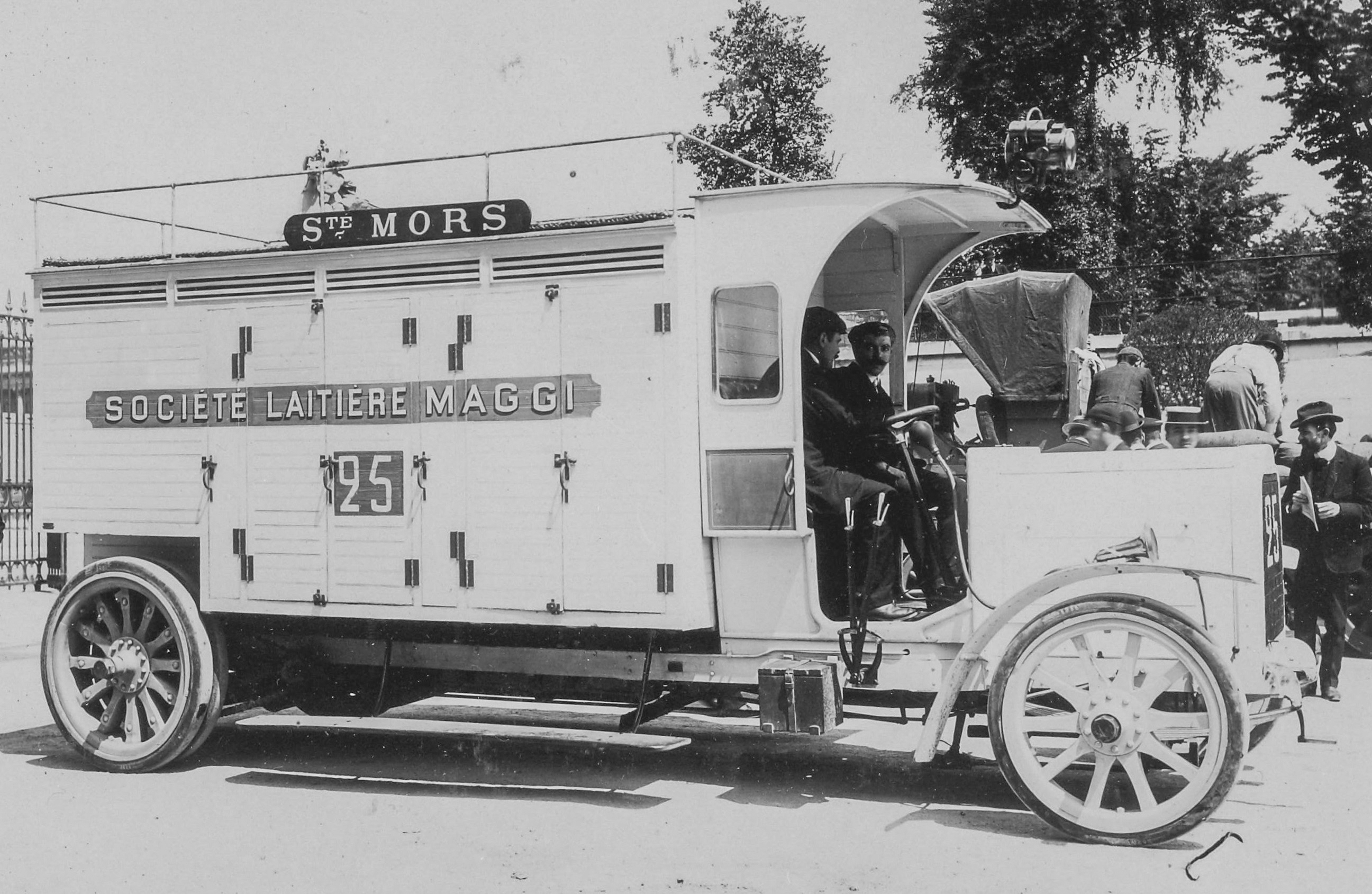 [Collection Jules Beau. Photographie sportive] : T. 32. AnnÃ©e 1906 / Jules Beau : F. 12v. [Concours International de vÃ©hicules industriels, Paris - Tourcoing, organisÃ© par l' A. C.[Autocycle Club] du Nord de la France, 6 - 17 juin 1906]